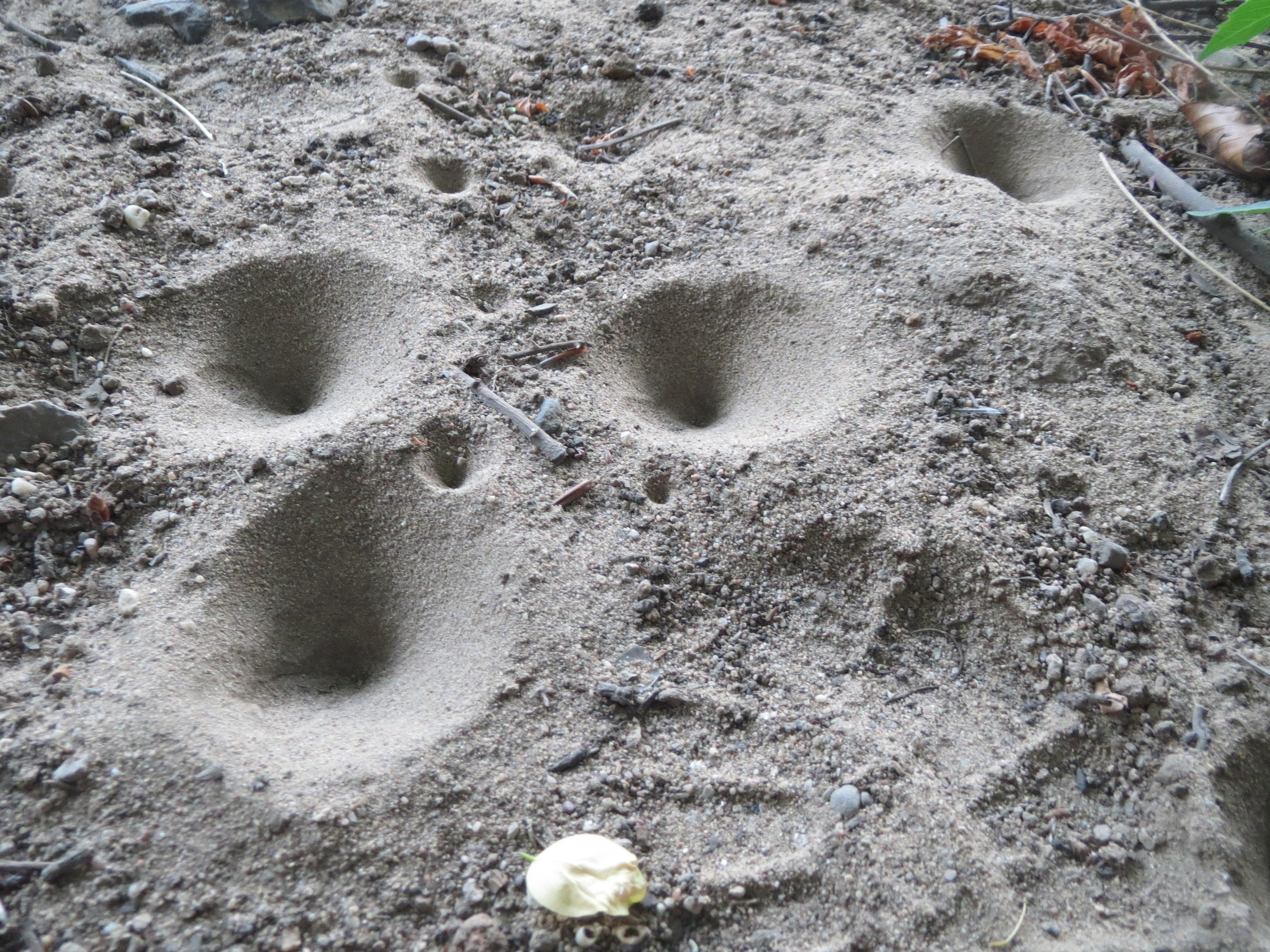 Typische Bauten des Ameisenlöwen, der Larve der Geflecktflügligen Ameisenjungfer (Euroleon nostras) unter einer Brücke in der Schwetzinger Hardt